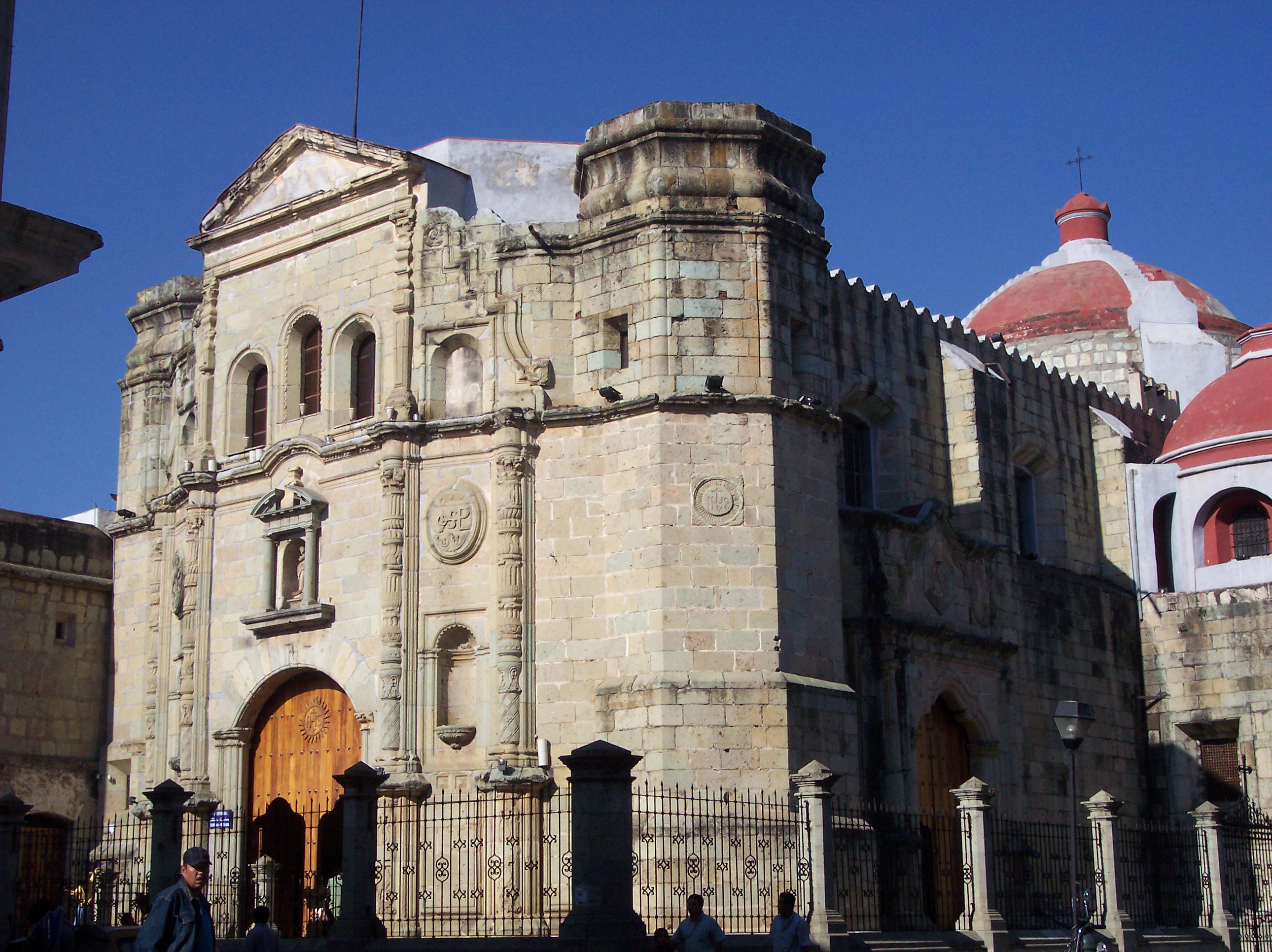 Church in the Historical Center of Oaxaca de Juárez City. THE NAME MOST BE WRITTEN. SPANISH - Iglesia a una esquina del parque central. EL NOMBRE ESTÁ PENDIENTE. Located in: Oaxaca de Juárez, capital of Oaxaca State, Mexico.no